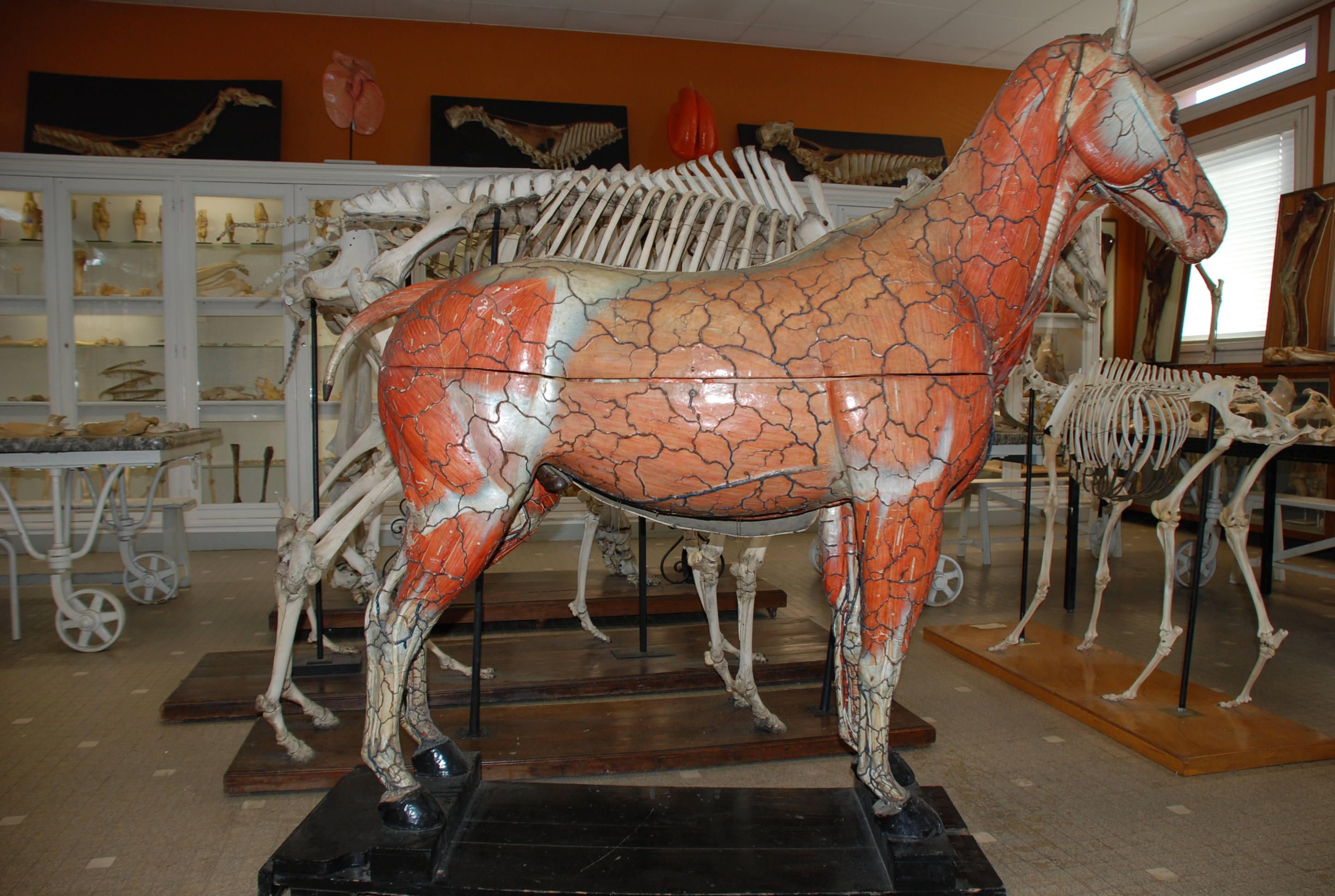 Modèle anatomique de cheval du Dr Louis Auzoux au musée d'anatomie de l’École nationale vétérinaire de Toulouse